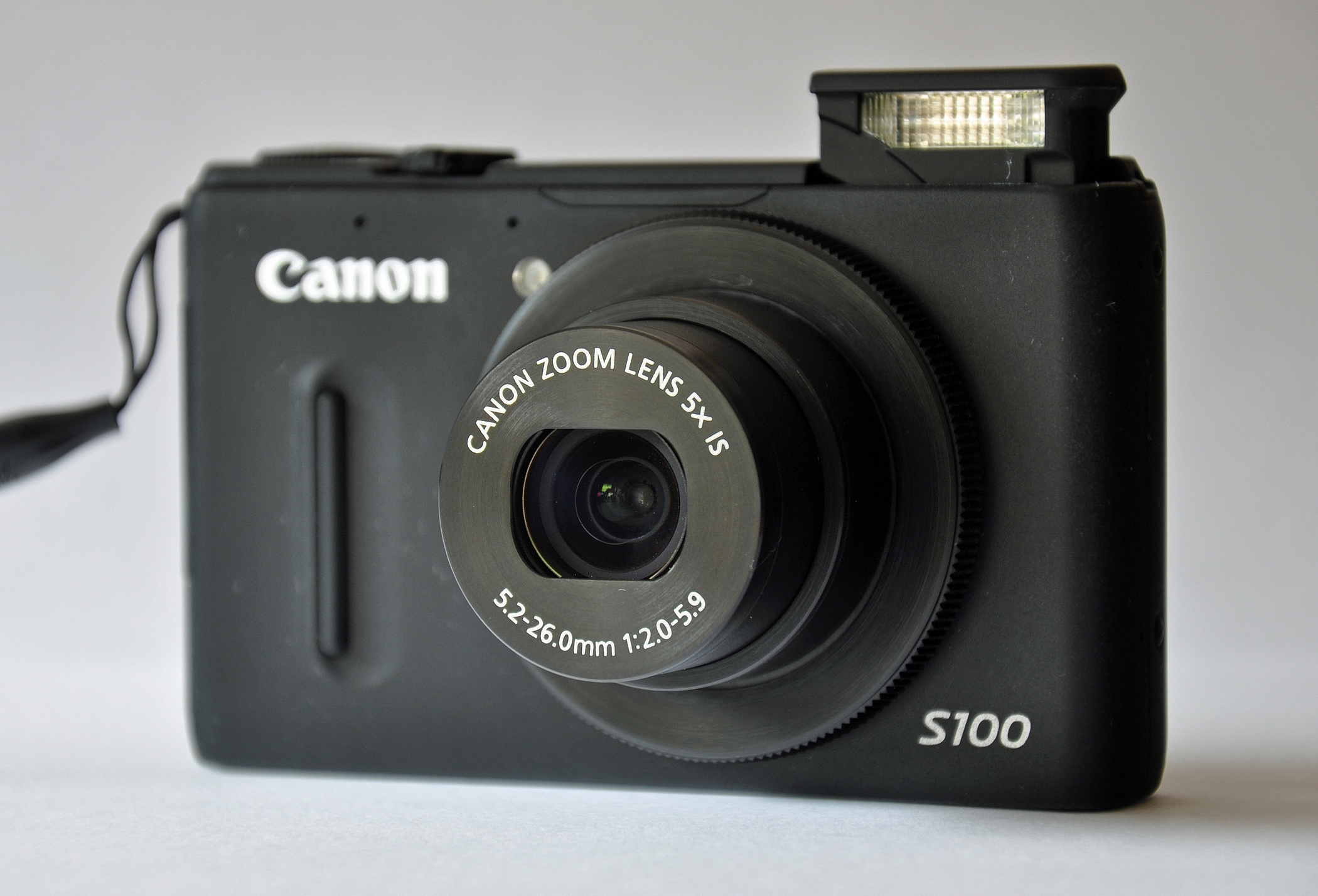 Die Canon PowerShot S100